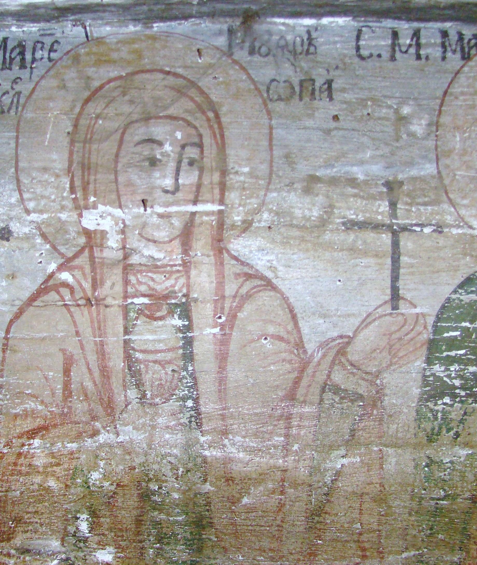 Biserica Sfinţii Arhangheli, Sat Brusturi, Comuna Creaca, județul Sălaj